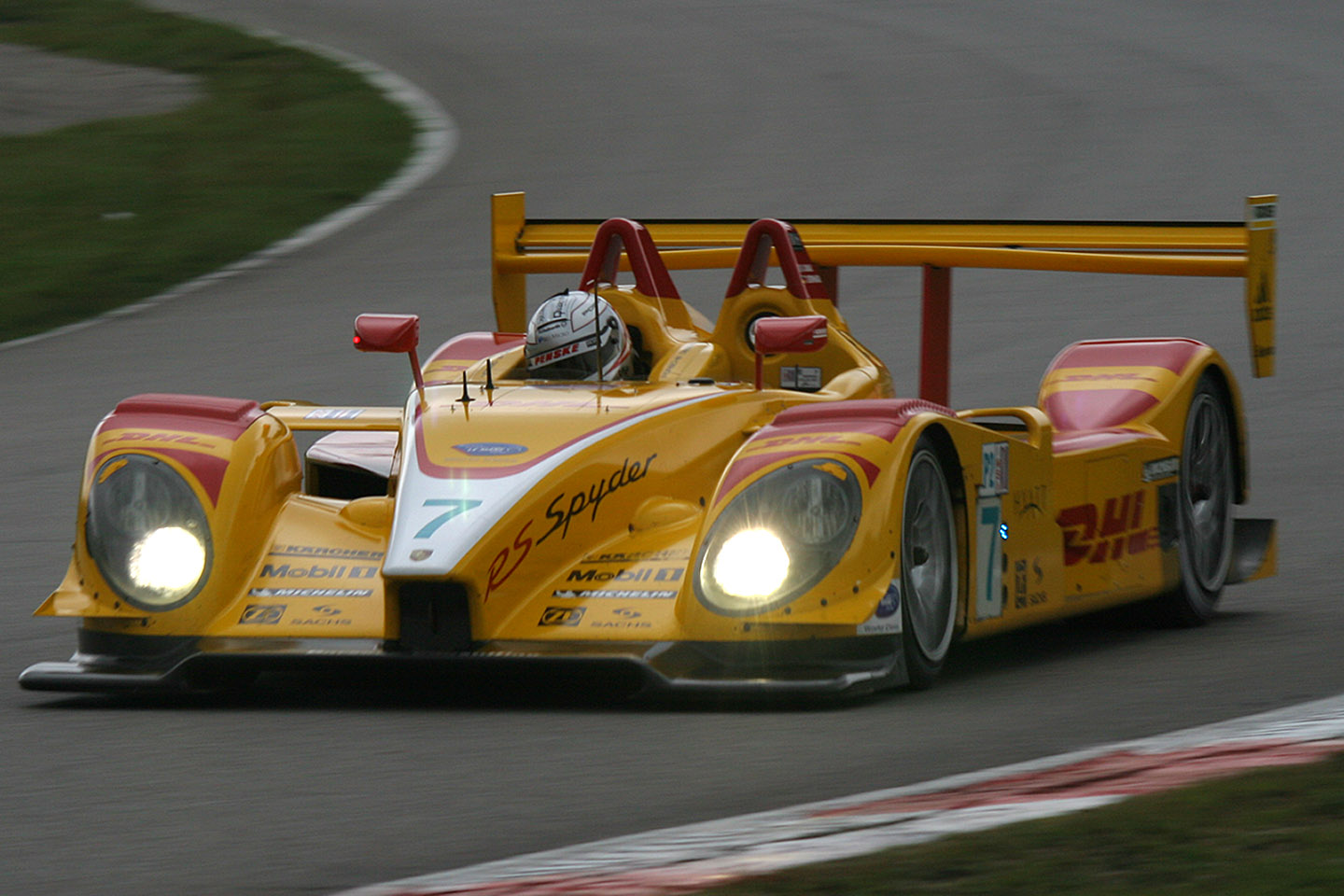 7 Penske Motorsports Porsche RS Spyder: Romain Dumas, Timo Bernhard